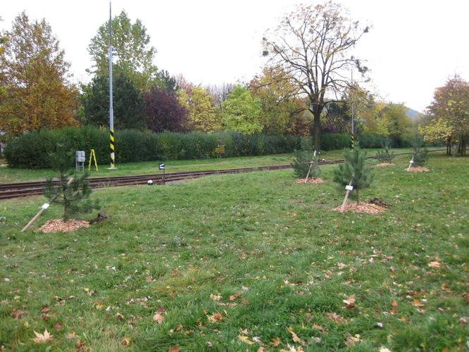 Alej Lindsey Stirling - borovice černé